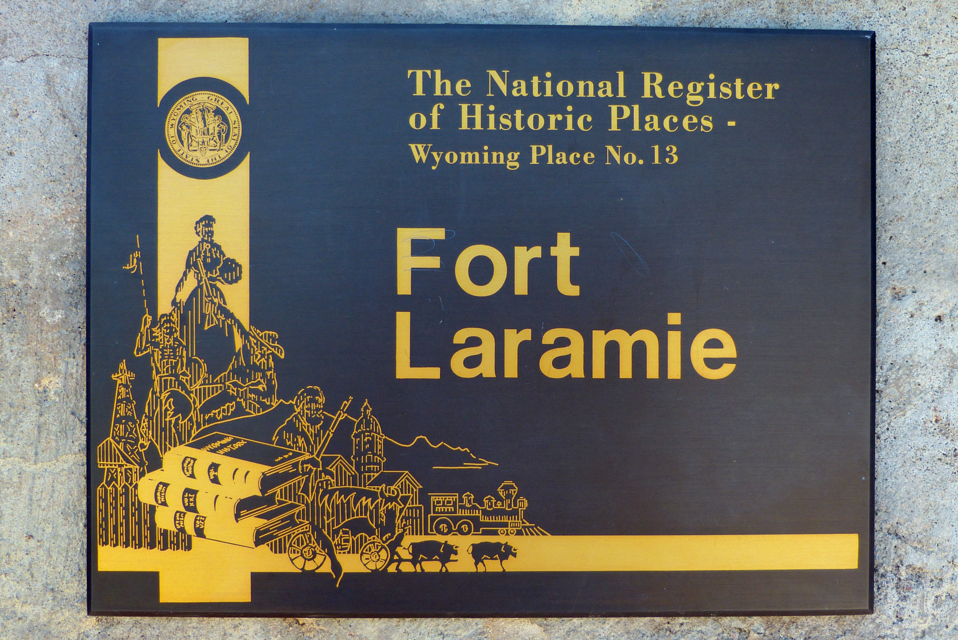 Plakete The National Register of Historic Places No.13 - Wyoming